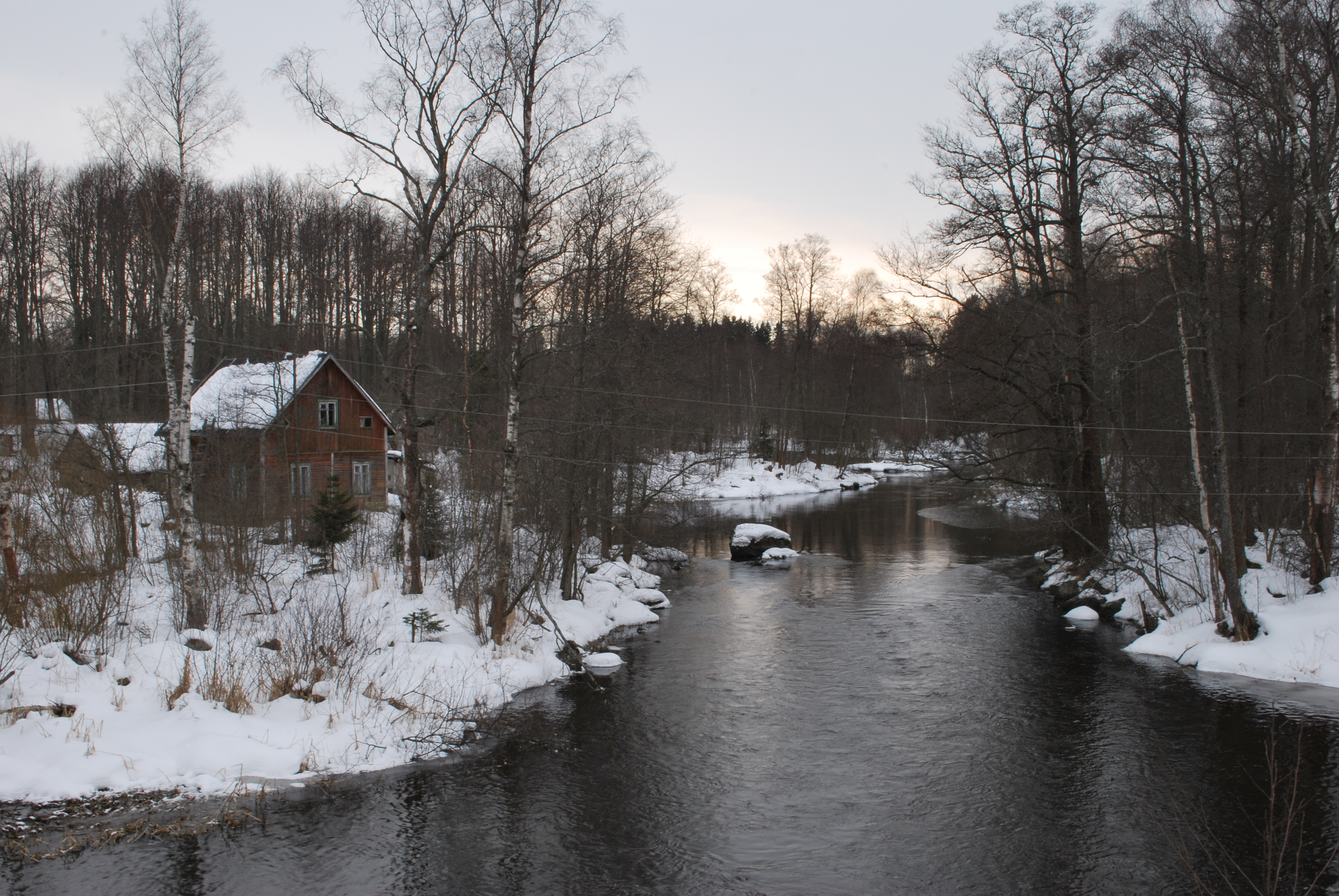 River Tihaya near Brigadnoe village